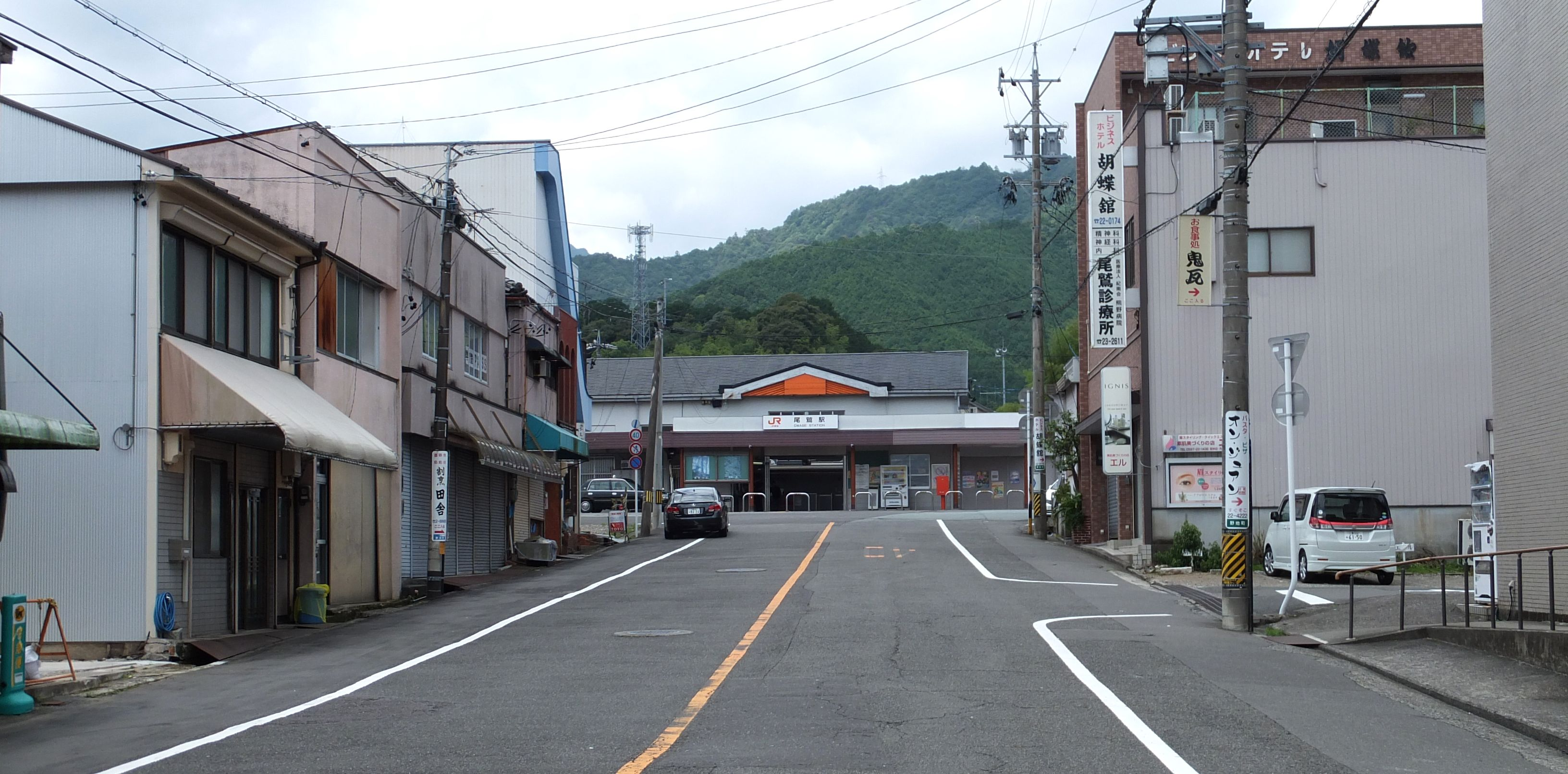 尾鷲駅前風景